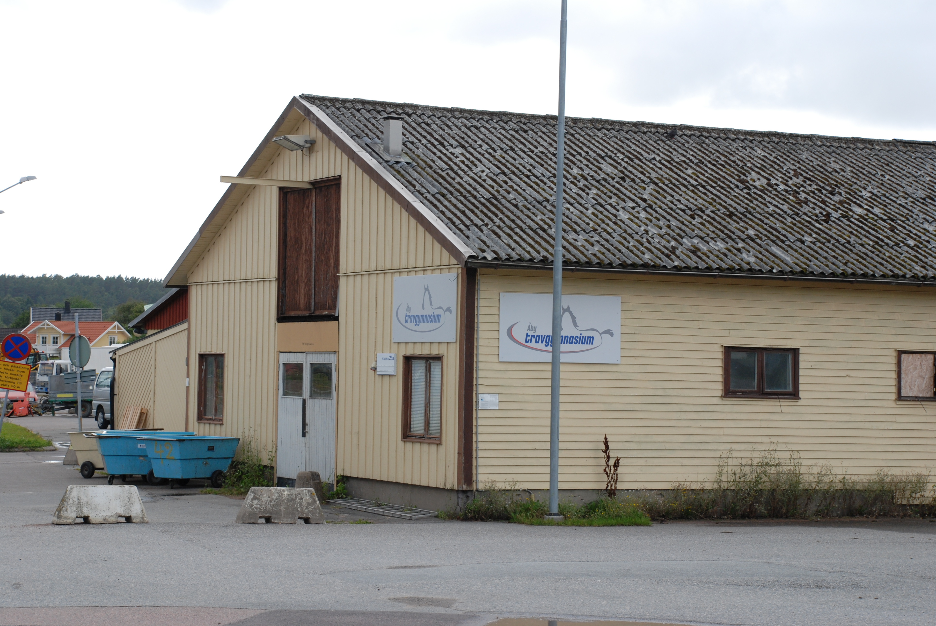 Stallar vid Åbytravet i Mölndal. Även lokaler för Åby travgymnasium.